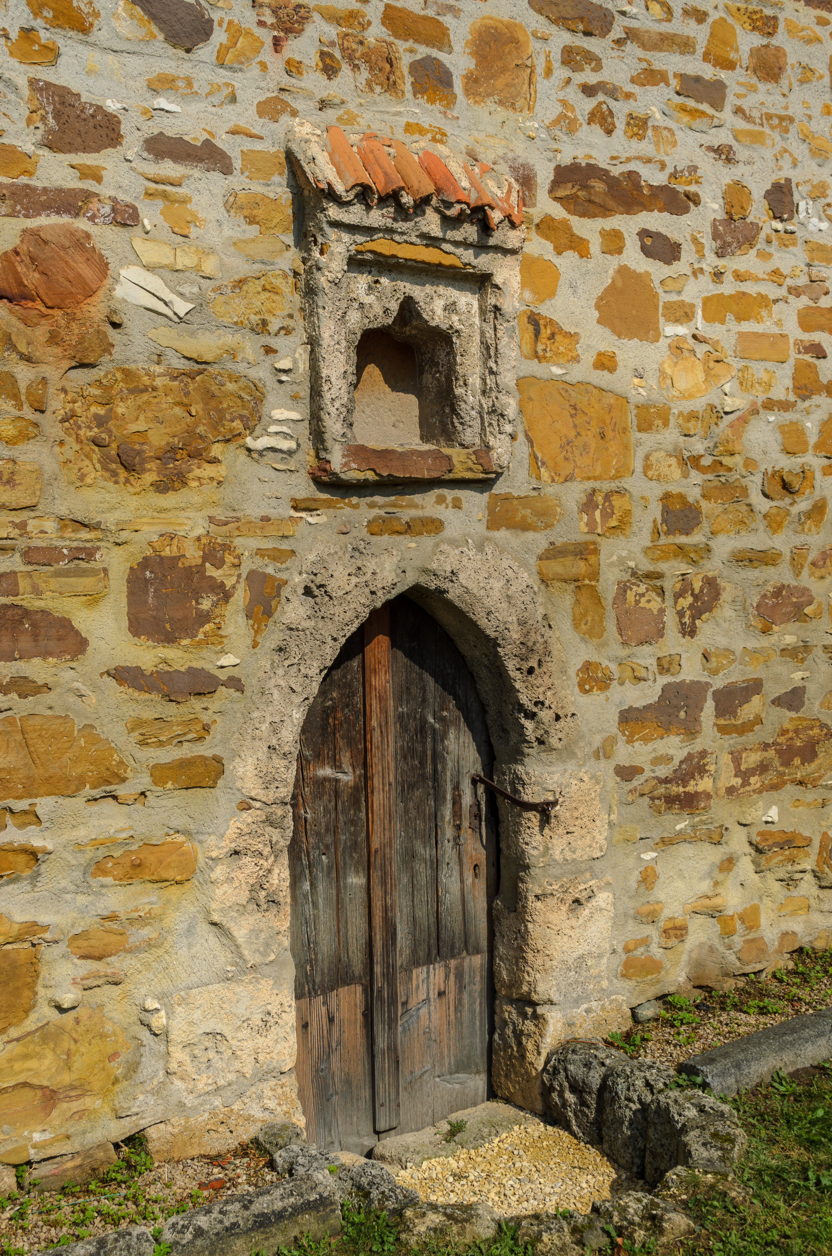 Erste urkundliche Erwähnung 1471